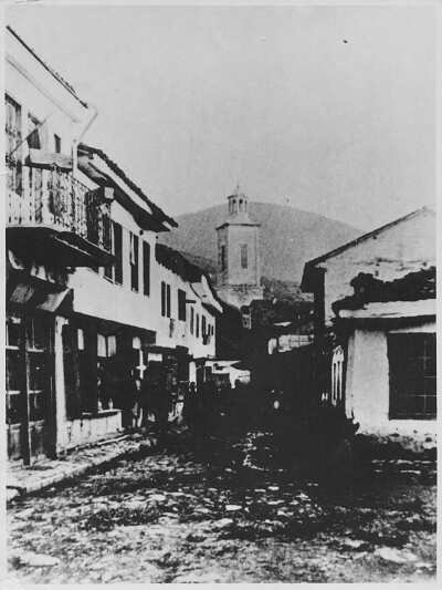 Саат кулата во Кичево.